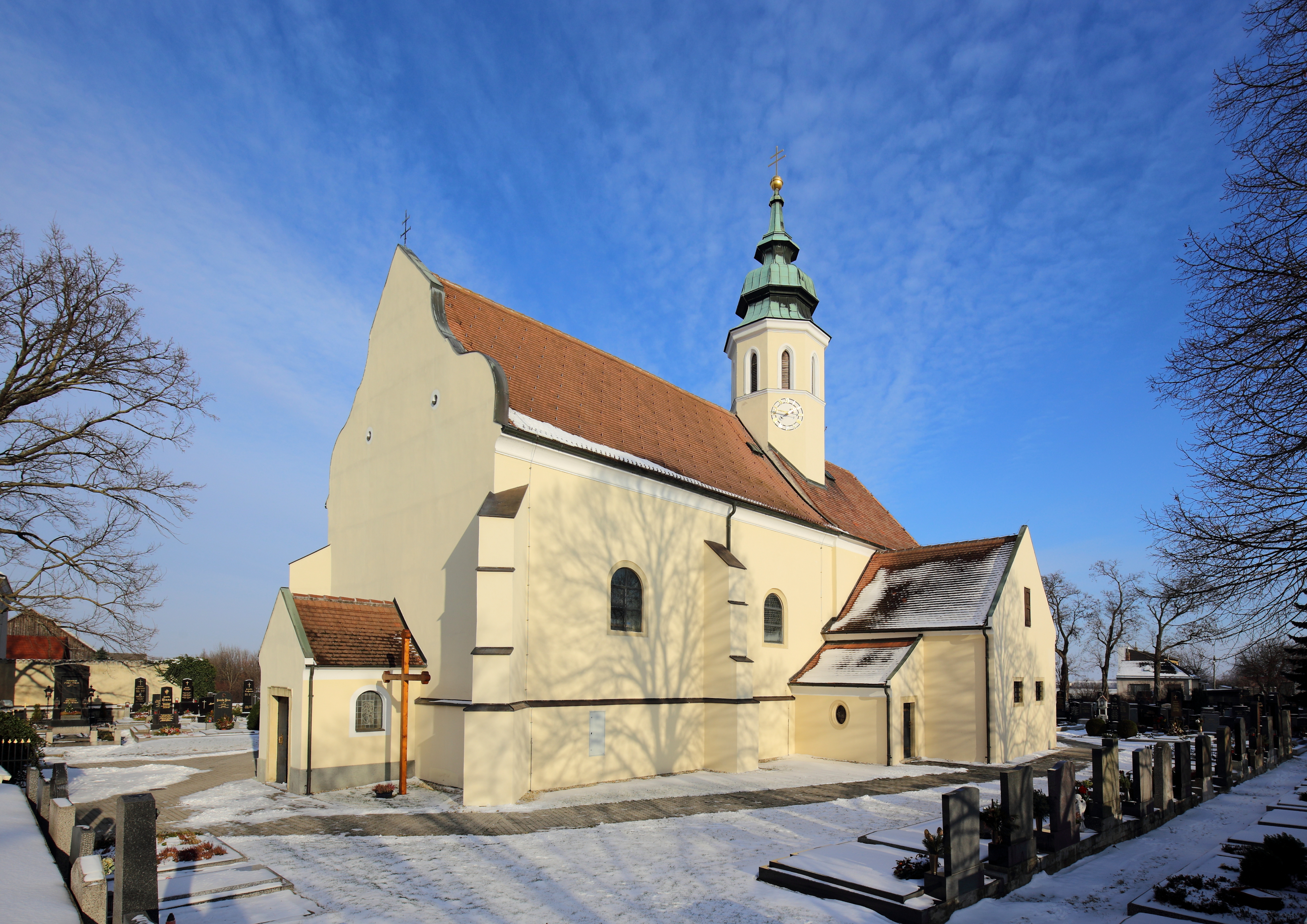 Südwestansicht der katholische Pfarrkirche hll. Petrus und Paulus in der niederösterreichischen Stadtgemeinde Gerasdorf bei Wien.